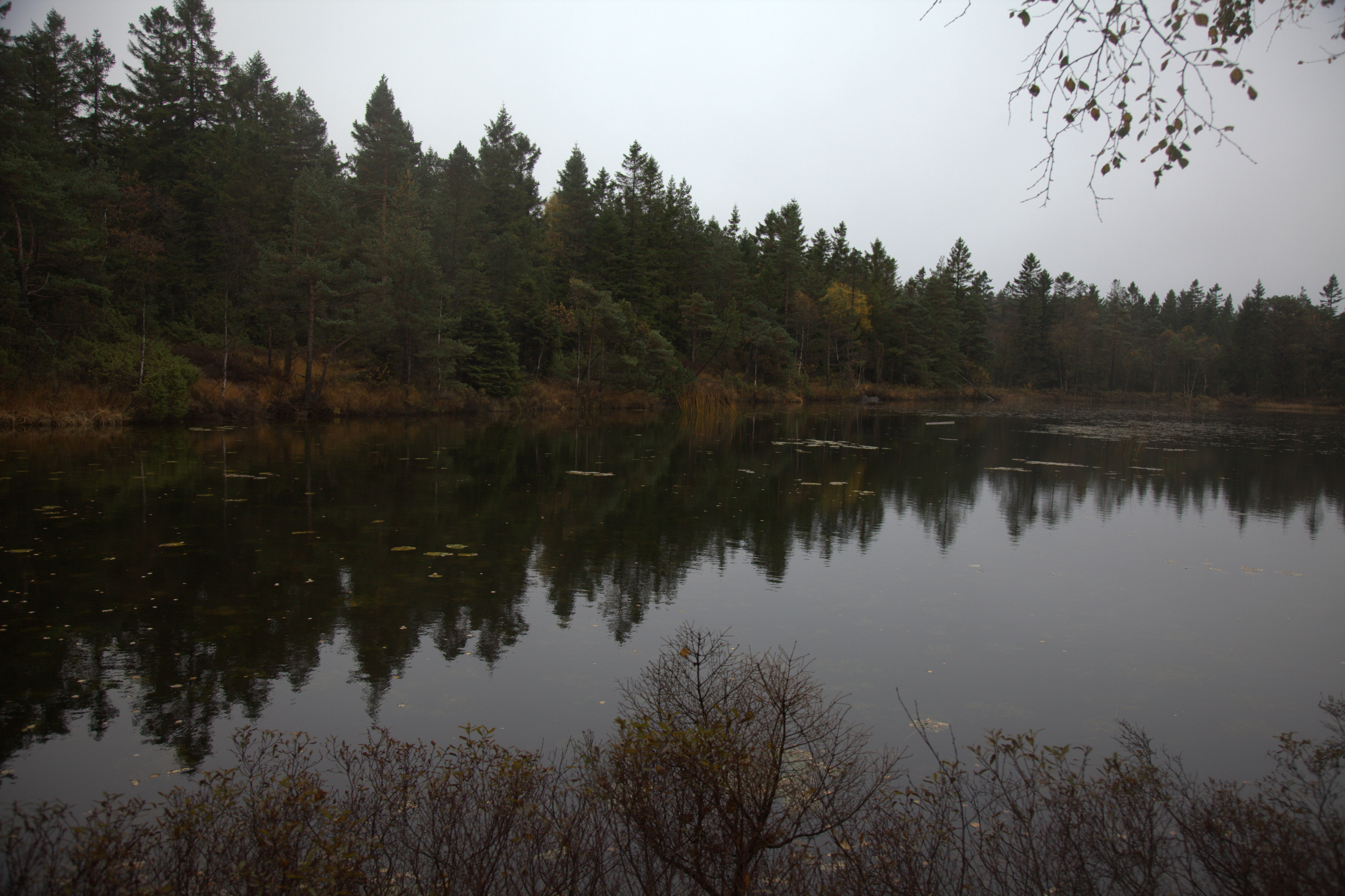 Tranevatten i Kungälv